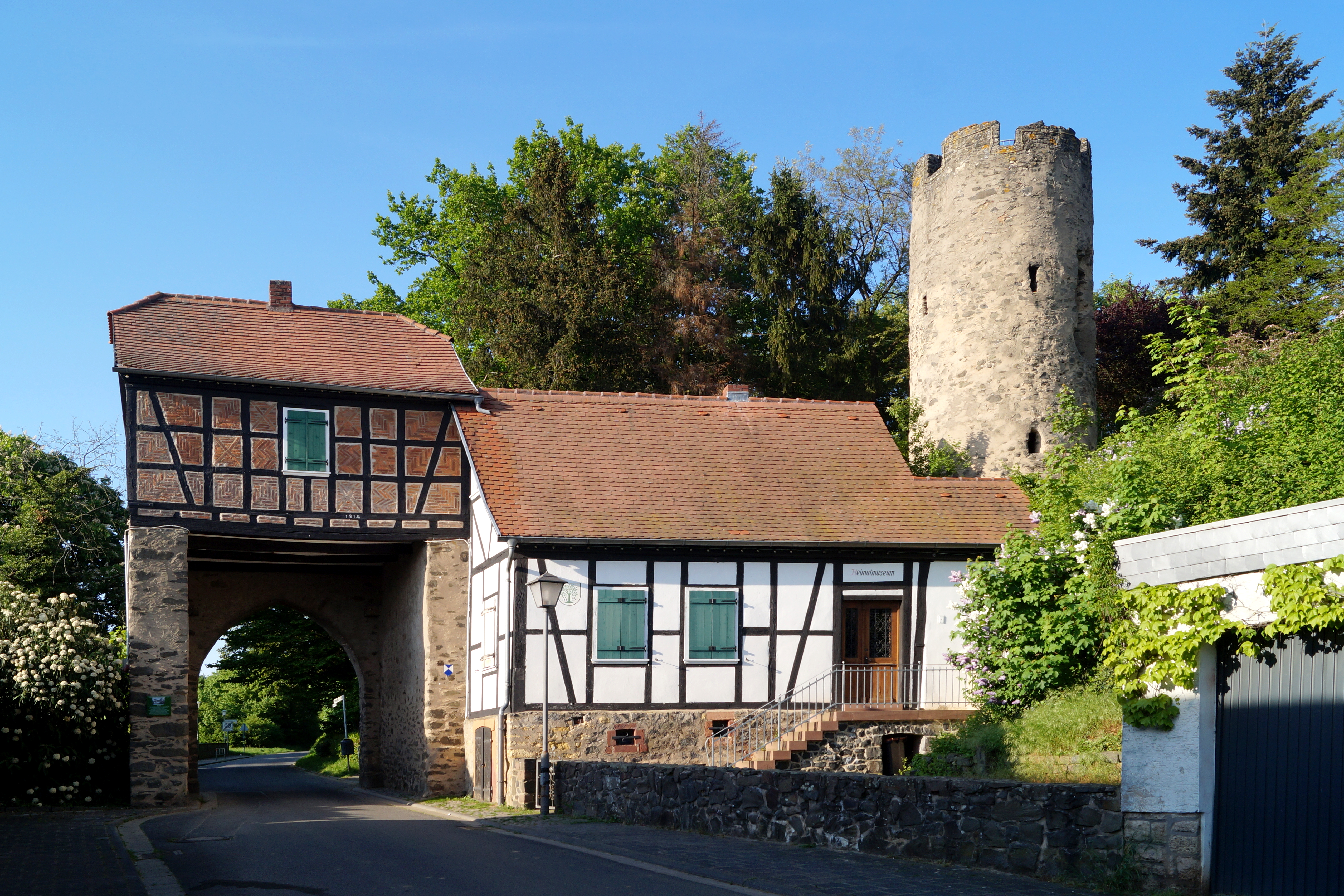 Obertor (links) und Heimatmuseum mit Wehrturm (rechts) in Hanau-Mittelbuchen.